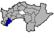 KaurJmeb為編輯臺灣省嘉義縣義竹鄉，於2005年2月10日所繪。